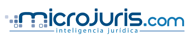 microjuris logo